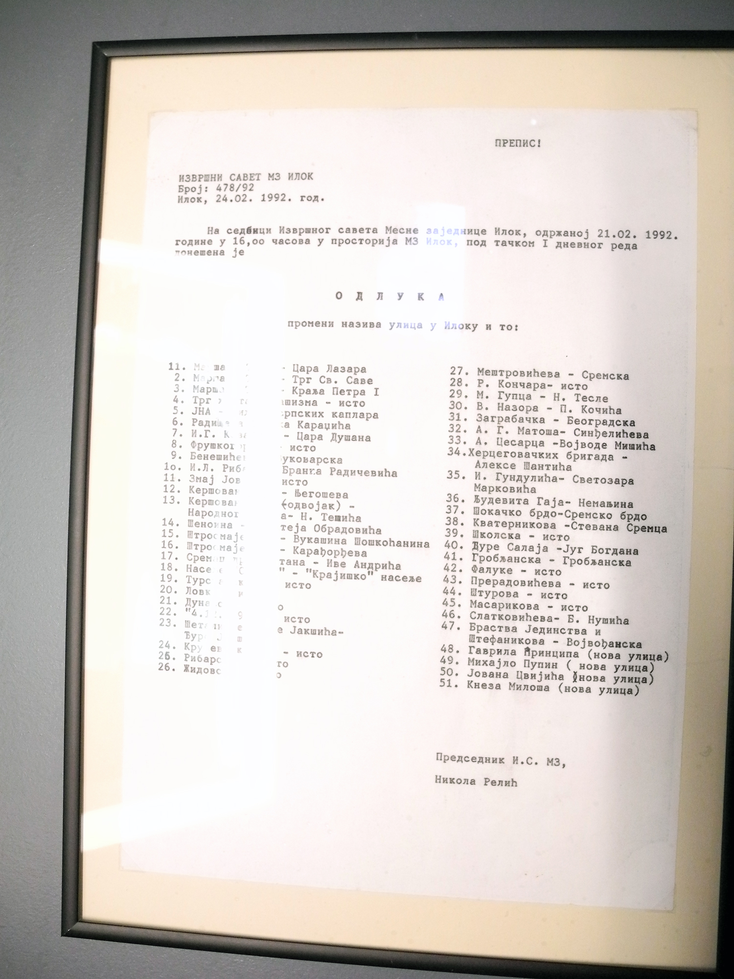 Izložba Domovinski rat u Hrvatskom povijesnom muzeju tijekom Noći muzeja.